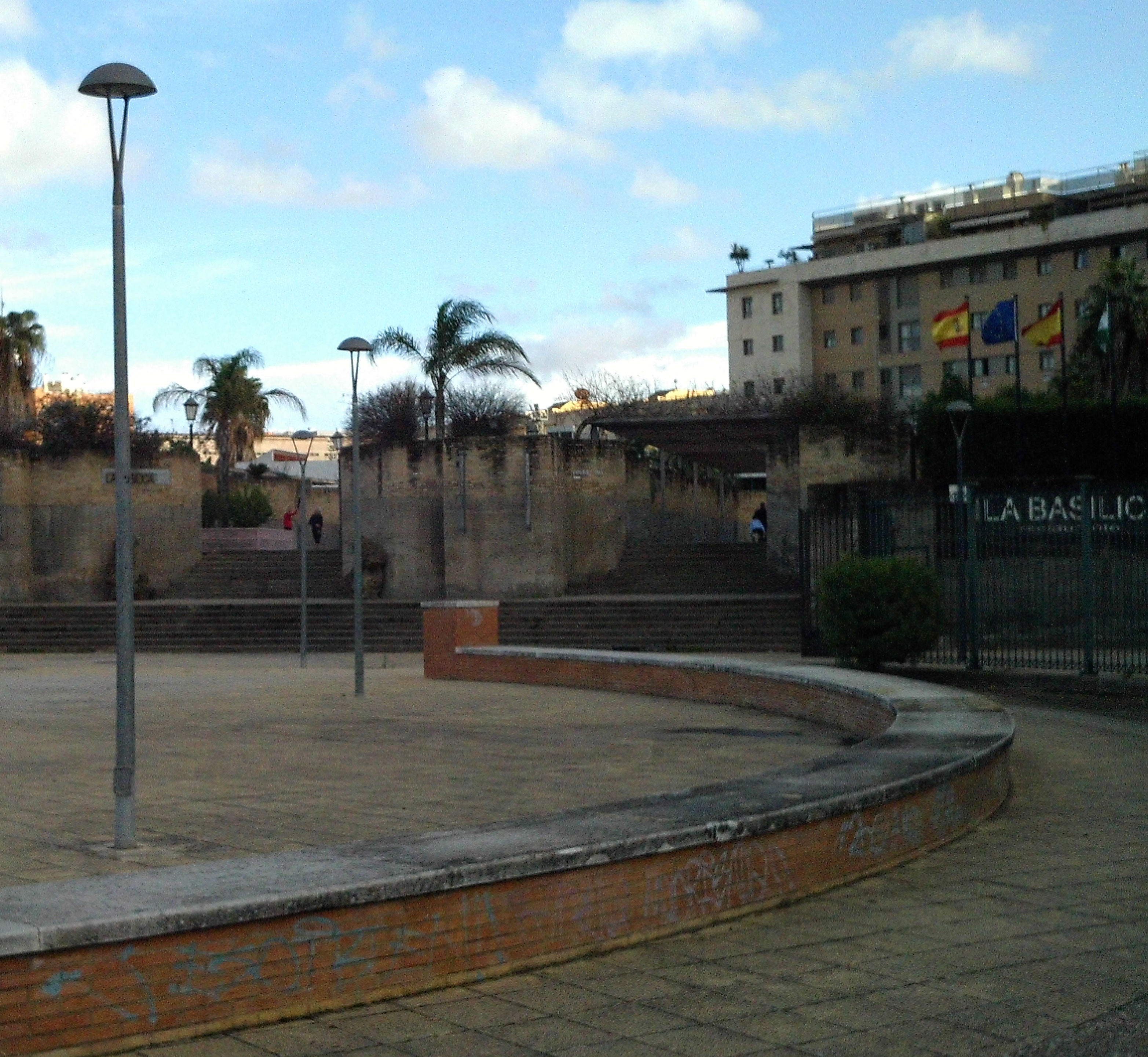 Basamentos de la basílica de Aníbal González. En la actualidad están junto a una plaza. Entre ellos está el restaurante La Basílica. Se encuentran próximos a los jardines de la Buhaira. Sevilla, Andalucía, España.